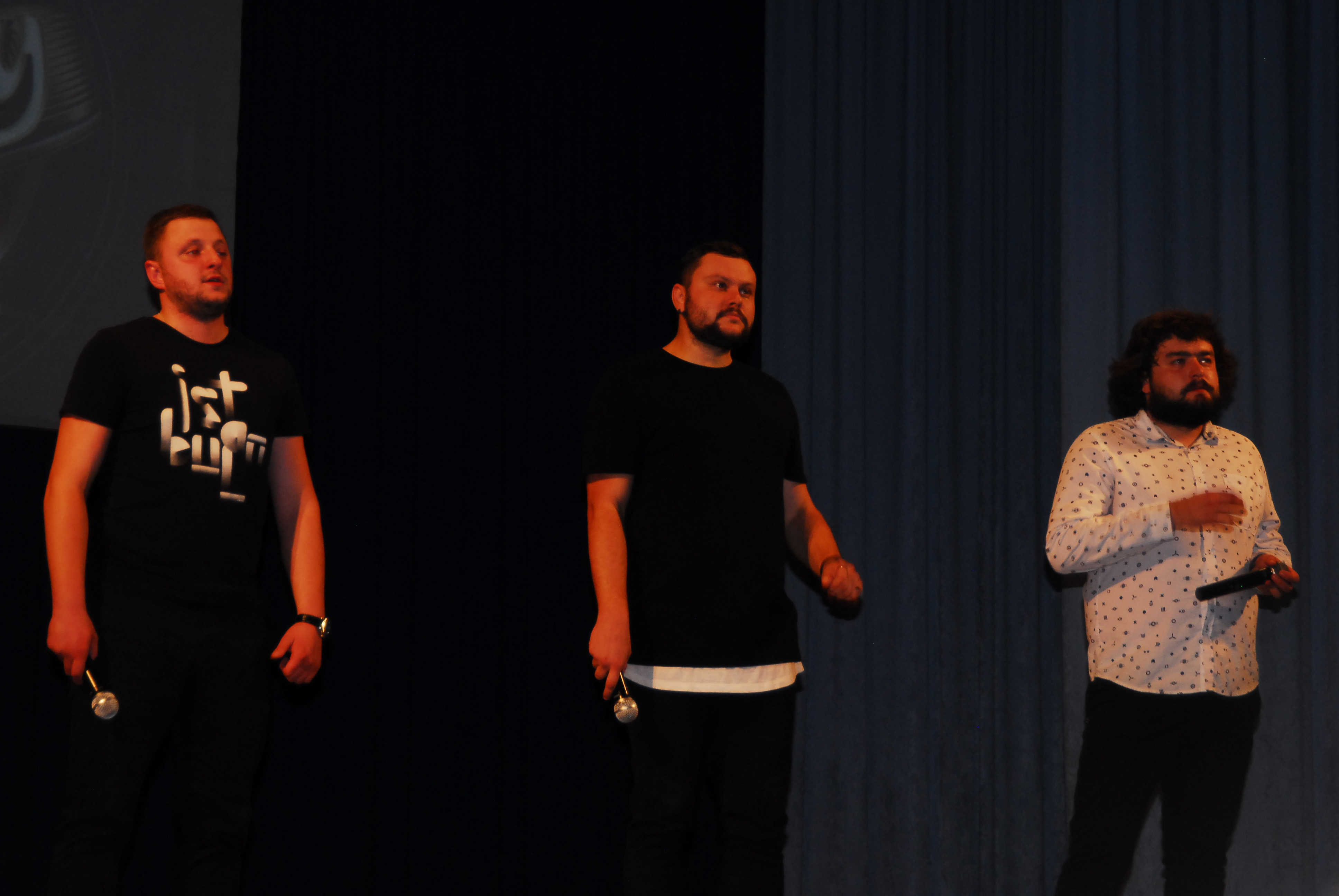 Мелитополь